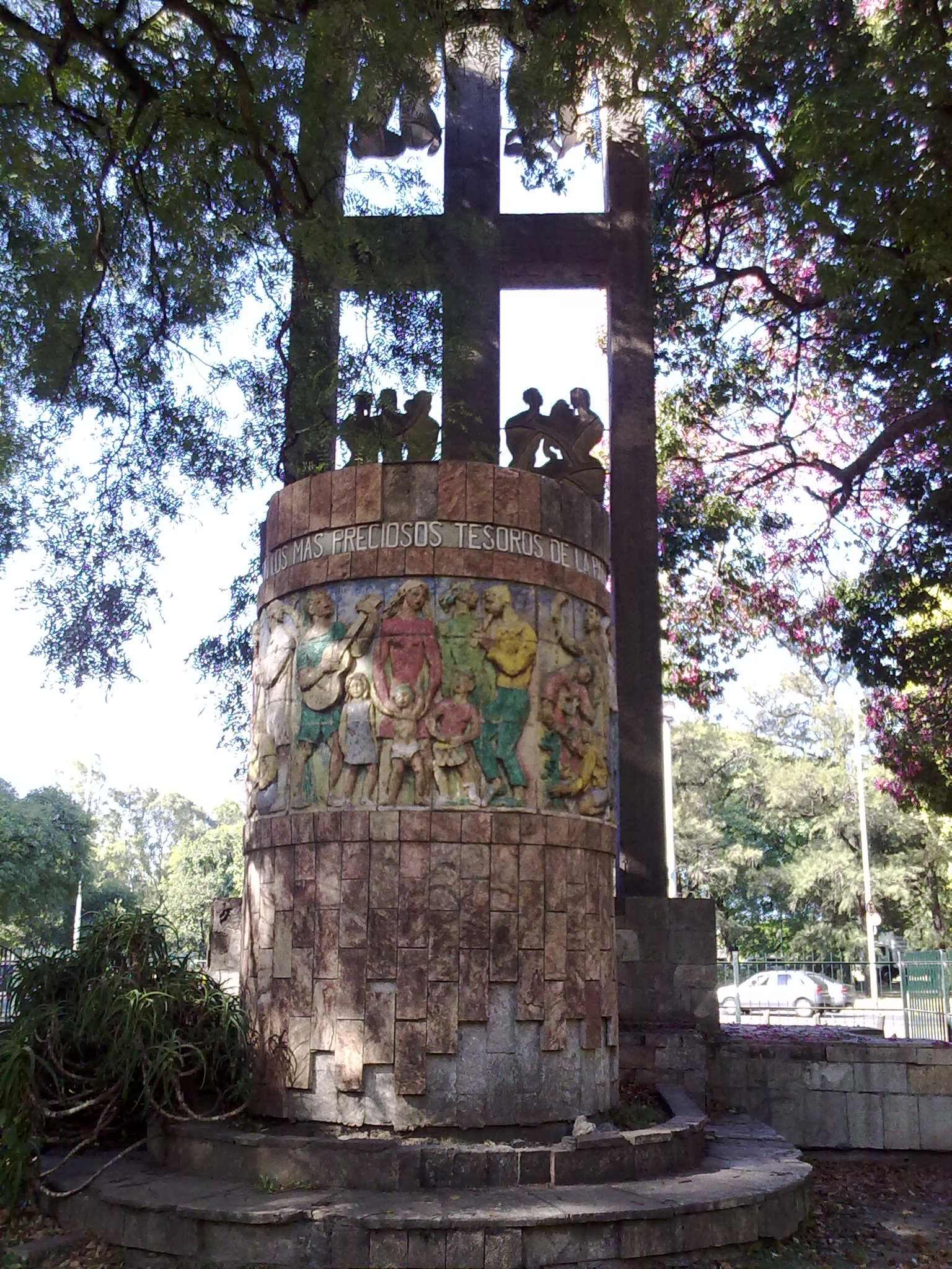 Monumento a William C. Morris, en Parque Tres de Febrero (Palermo).